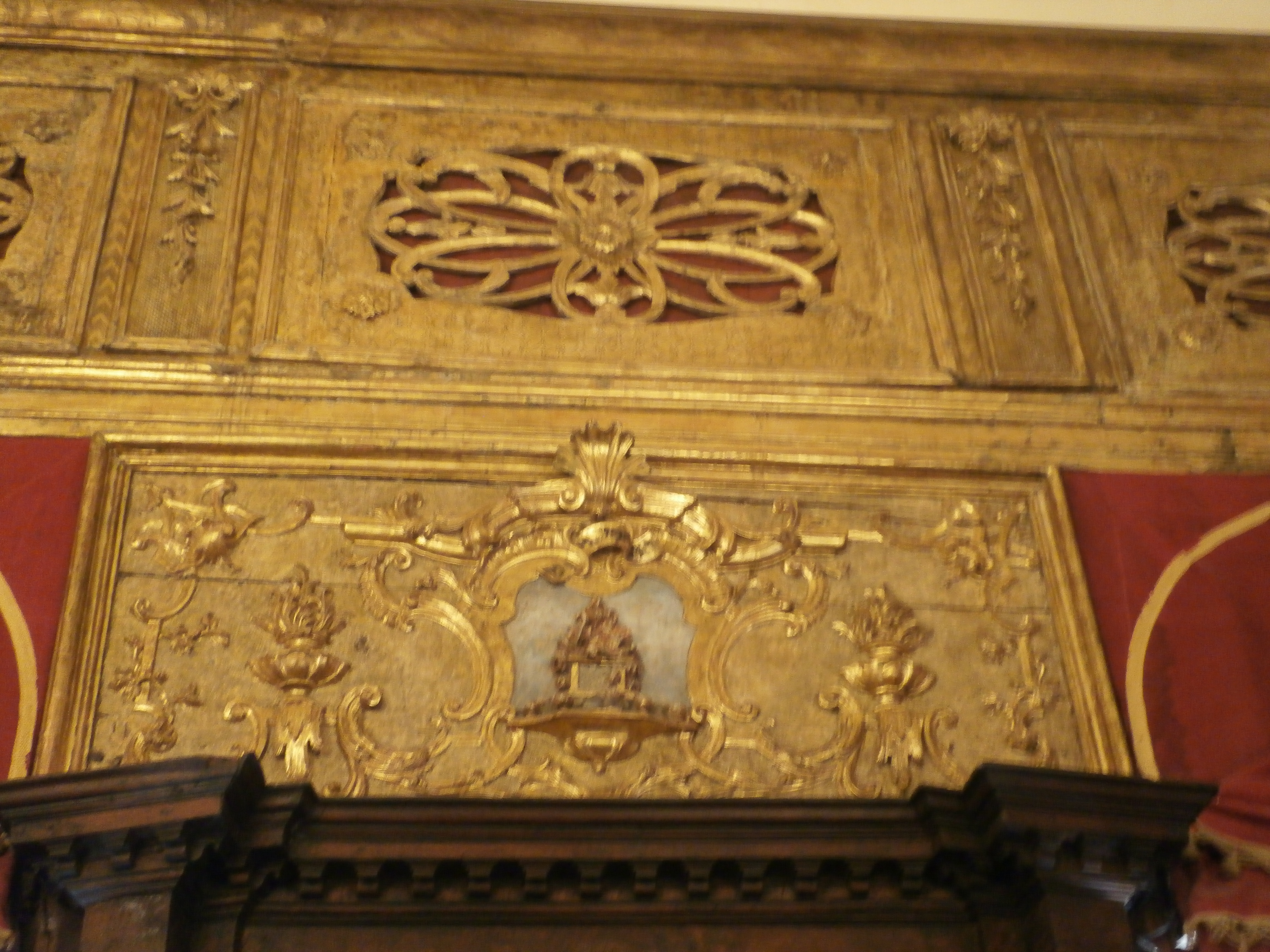 בתי הכנסת העתיקים בגטו וונציה